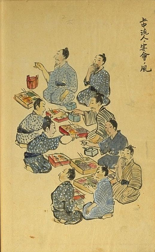 《德之島事情》插圖